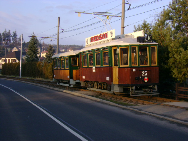 Fotografování vozů 25 + 69 na "Kyjovické" trati u zastávky Nová Plzeň na tram. lince č.5 dne 31.12.2006